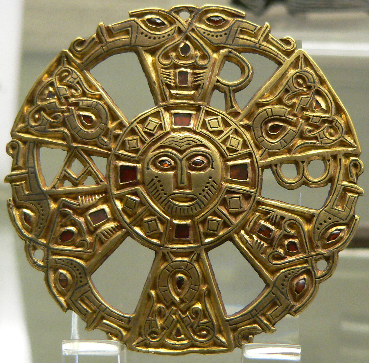 Disque de Limons Applique ornée d'un chrisme, d'un masque humain et de motifs zoomorphes.Or. Fonte à cire perdue, Art mérovingien, fin VIe-début VIIe siècle. Trouvé à Limons (Puy-de-Dôme). Acquis de l'architecte Victor Gay en 1855.